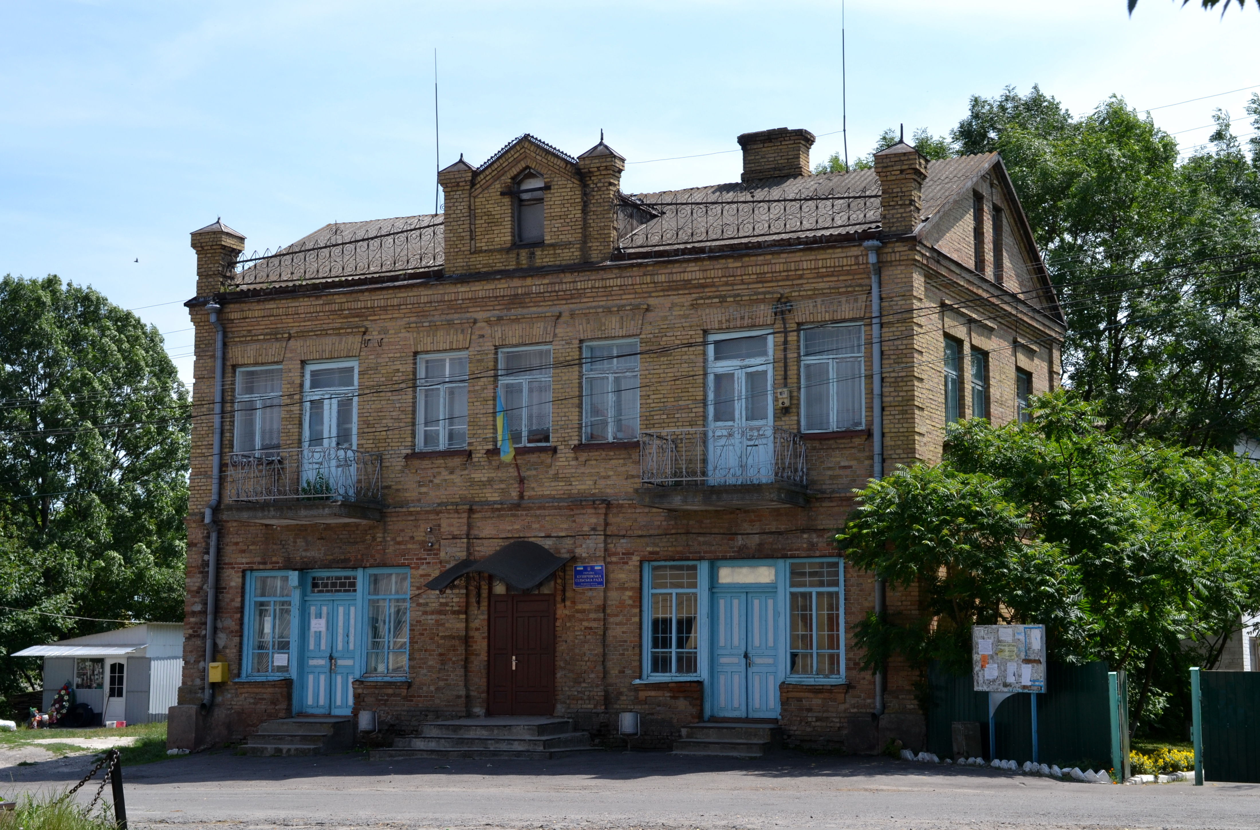 Панський будинок (ХVІІІ-ХІХ ст.) - вигляд із заходу - Купичів (вул. Незалежності, 28 (сільрада, пошта)) Турійський район Волинська область Україна